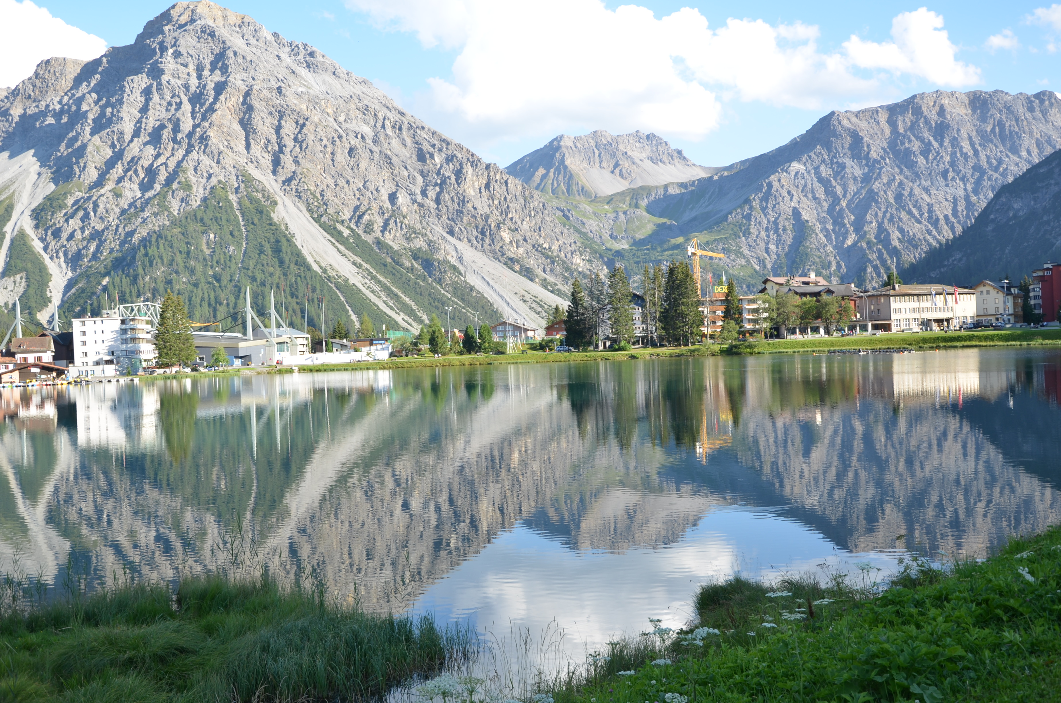 Lac Arosa